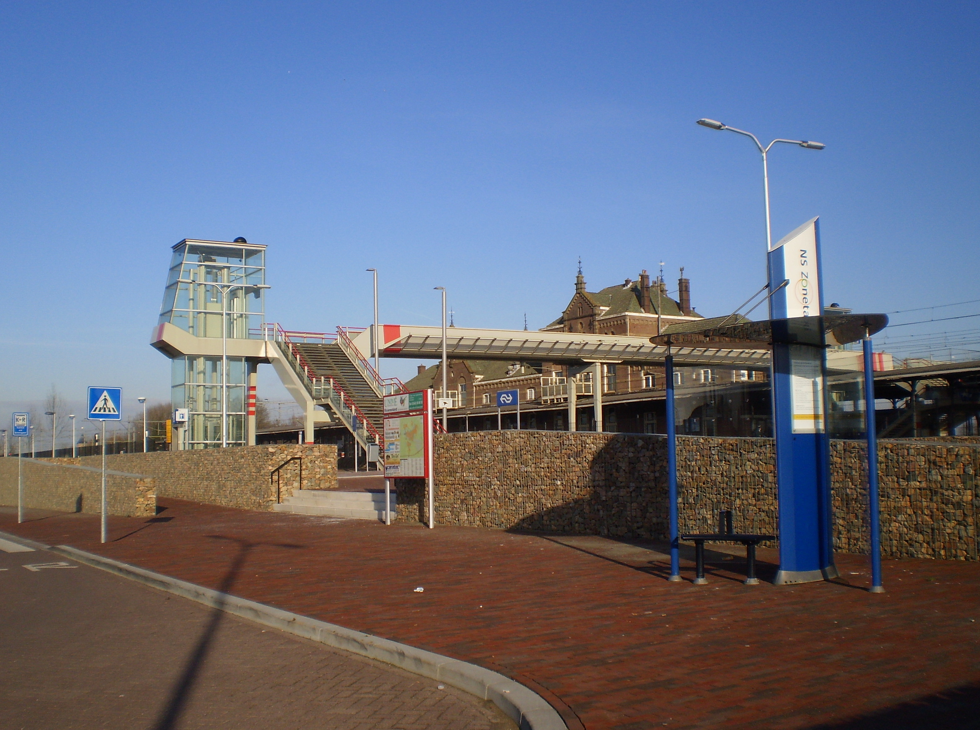 Westelijk stationsgebied Geldermalsen, gerenoveerd in 2011